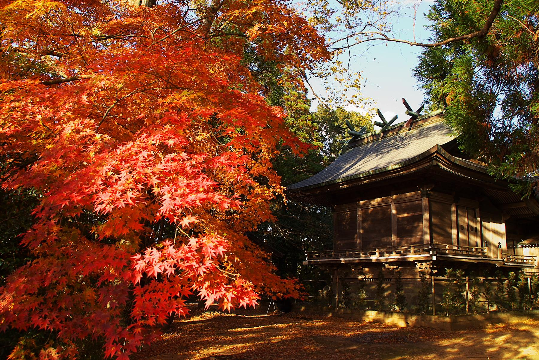 西渓公園